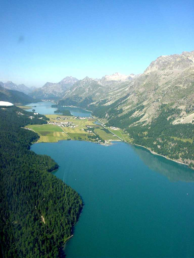 Sils, lacs de Sils et Silvaplana (cliché 13.07.2003)